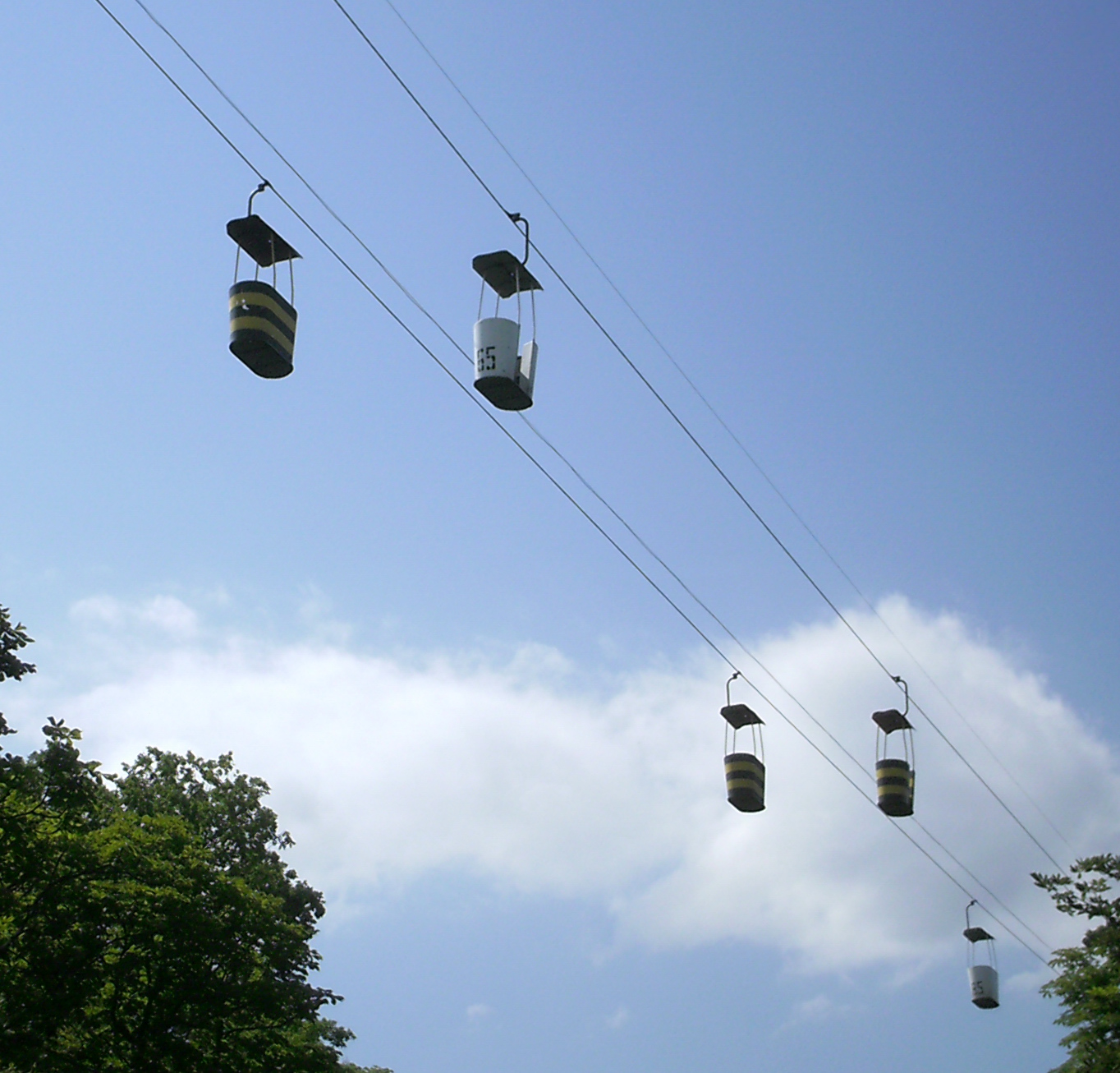 Харьковская канатная дорога, вид снизу